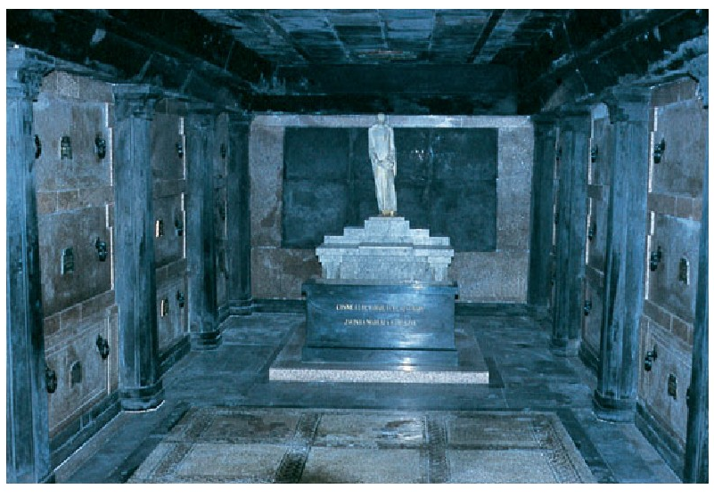 "San Cosme”, Francisco Durrioren obra